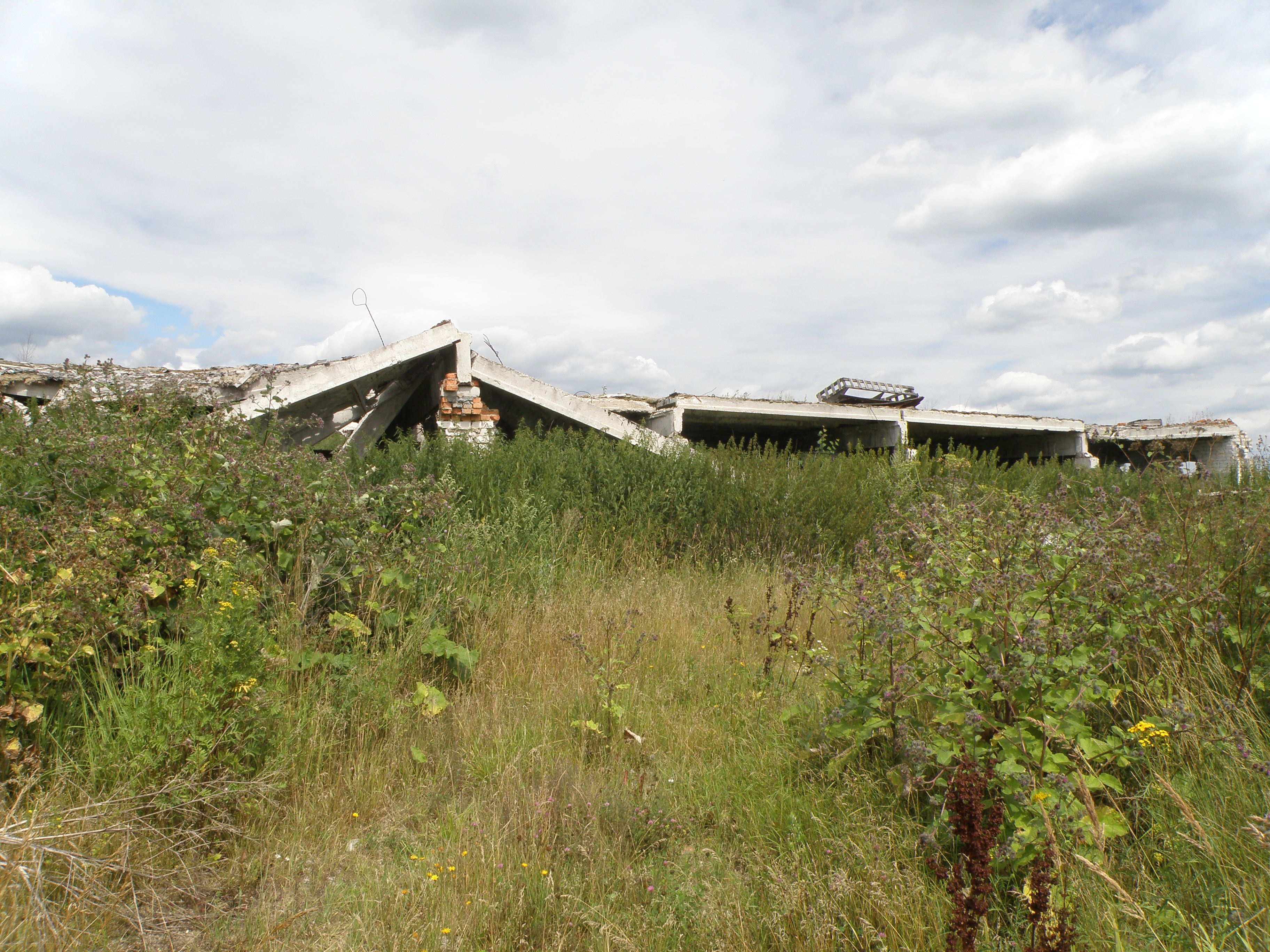 Развалины бывших коровников на задах д. Старково